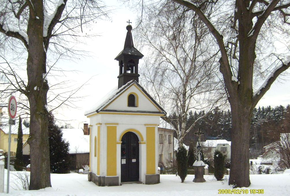 Česky: Kaple ve Staňkově